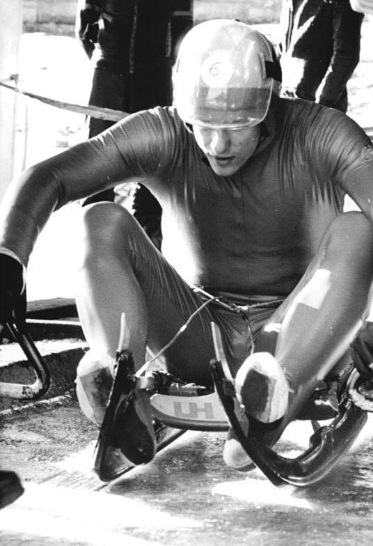 Uwe Handrich ADN-ZB Schaar 20.11.1982-Oberhof: Vorschaumotiv zur Europäischen Dreibahnen-Tournee am 27.-28.11.1982 auf der Oberhofer Kunsteis-Rennschlittenbahn-Letzte Konzentrationsphase vor dem Start für den 23jährigen Europameister von 1982, Uwe Handrich (ASK Vorwärts Oberhof-Foto von einem früheren Wettkampf). Der ehemalige Spartakiadesieger (1977) und Junioren-Europameister (1978) hofft beim Saison-Auftakt gegen internationale Konkurrenz seinen überraschenden Erfolg von Winterberg-BRD bestätigen zu können.